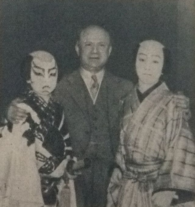 1921年の訪日の際、帝劇を訪れたミッシャ・エルマン